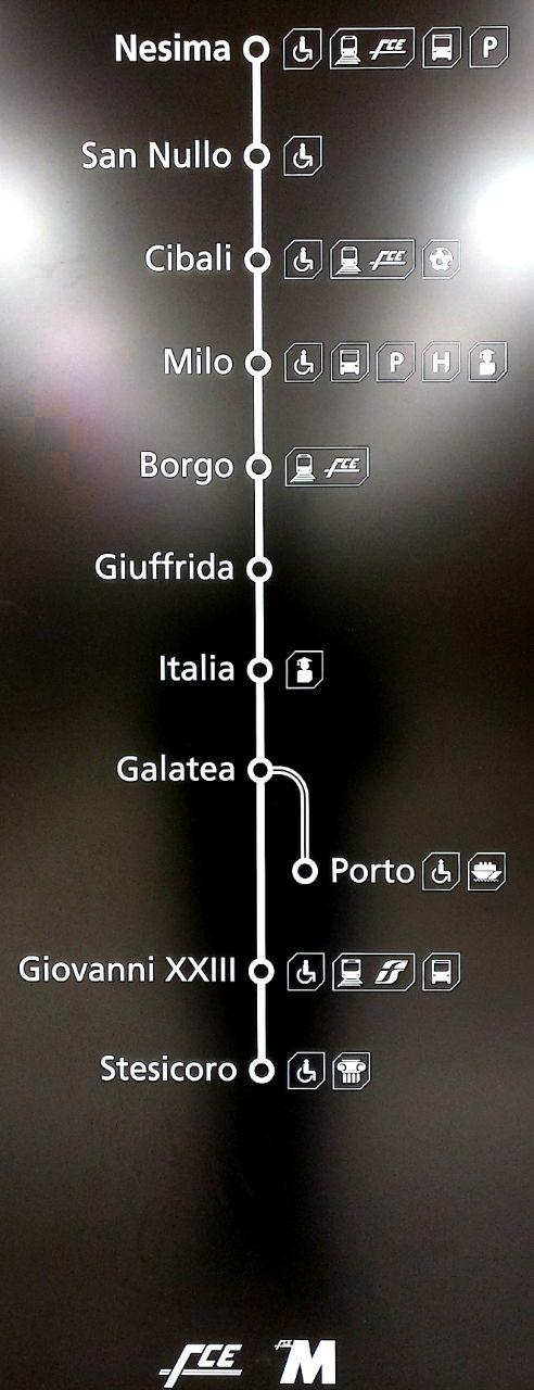 Mappa della rete metropolitana di Catania, affissa all'interno della stazione Nesima, fotografata nel primo giorno d'esercizio.